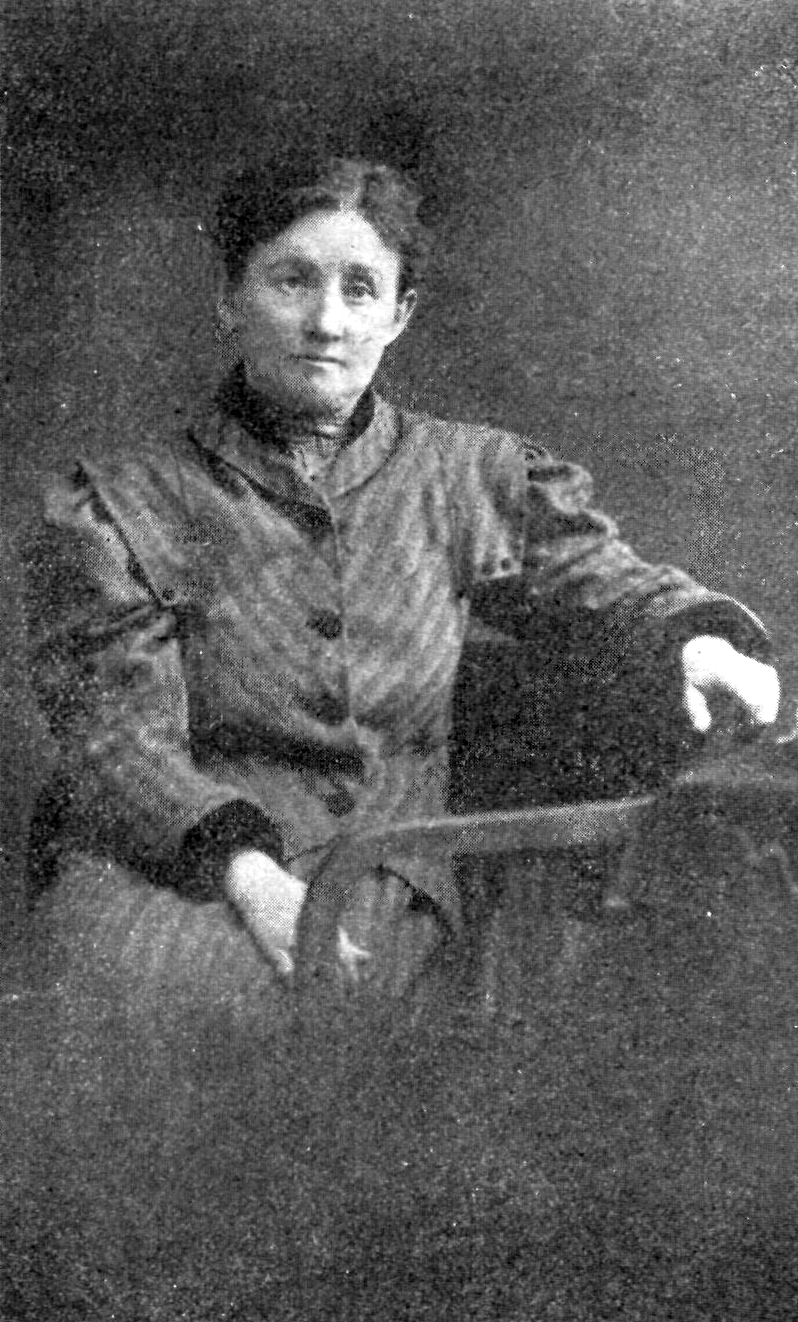 Maria Cunțan